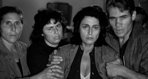 Screenshot from Mamma Roma directed by Pier Paolo Pasolini